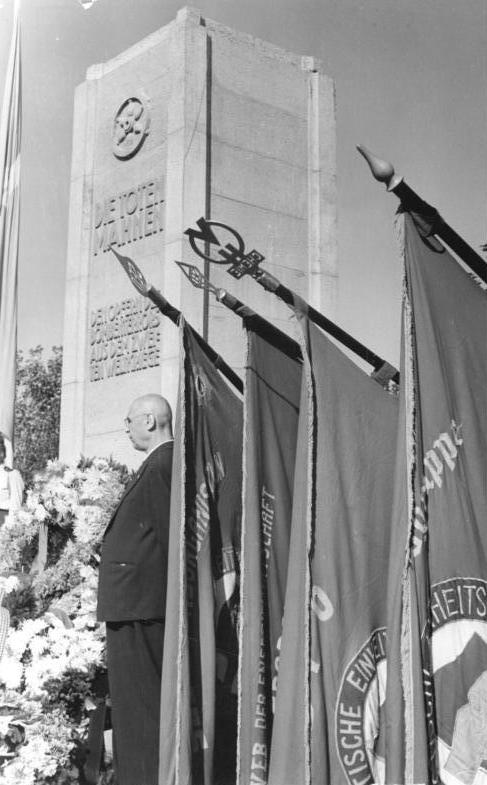 Erfurt, Mahnmal für Bombenopfer Zentralbild Blumenthal 1.9.1958 Tag des Friedens. Feierliche Enthüllung eines Mahnmals für die 1 392 Bombenopfer Erfurts. An der Stelle, wo im Ehrenhain des Erfurter Hauptfriedhofs, die 1392 Bombenopfer des zweiten Weltkrieges ihre letzte Ruhestätte gefunden haben, enthüllte am 31. August 1958 anläßlich des Tages des Friedens der Erfurter Oberbürgermeister Georg Boock unter starker Anteilnahme der Bevölkerung ein würdiges Mahnmal. UBz: Blick auf das Mahnmal nach der Kranzniederlegung.